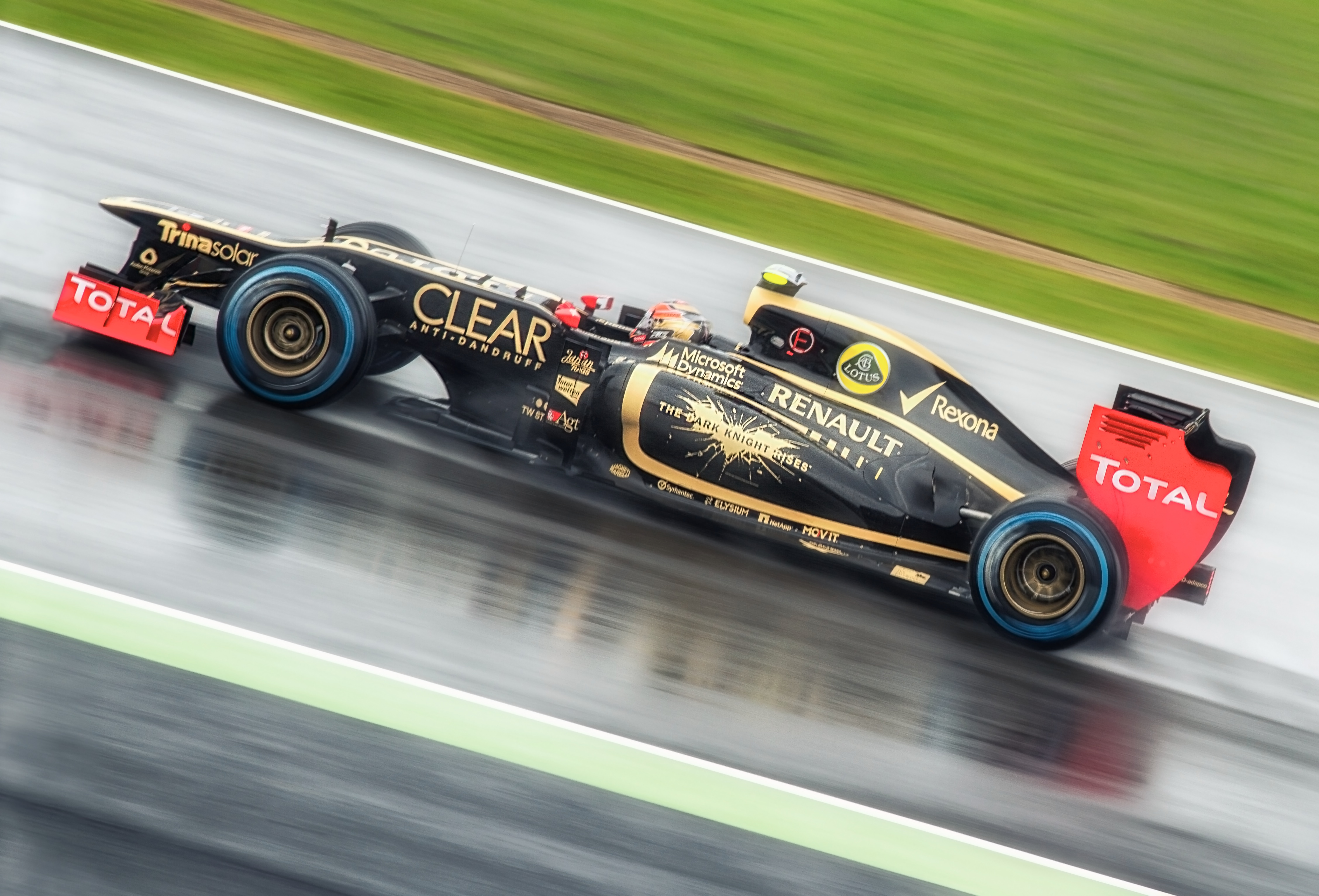 Grojeans Lotus